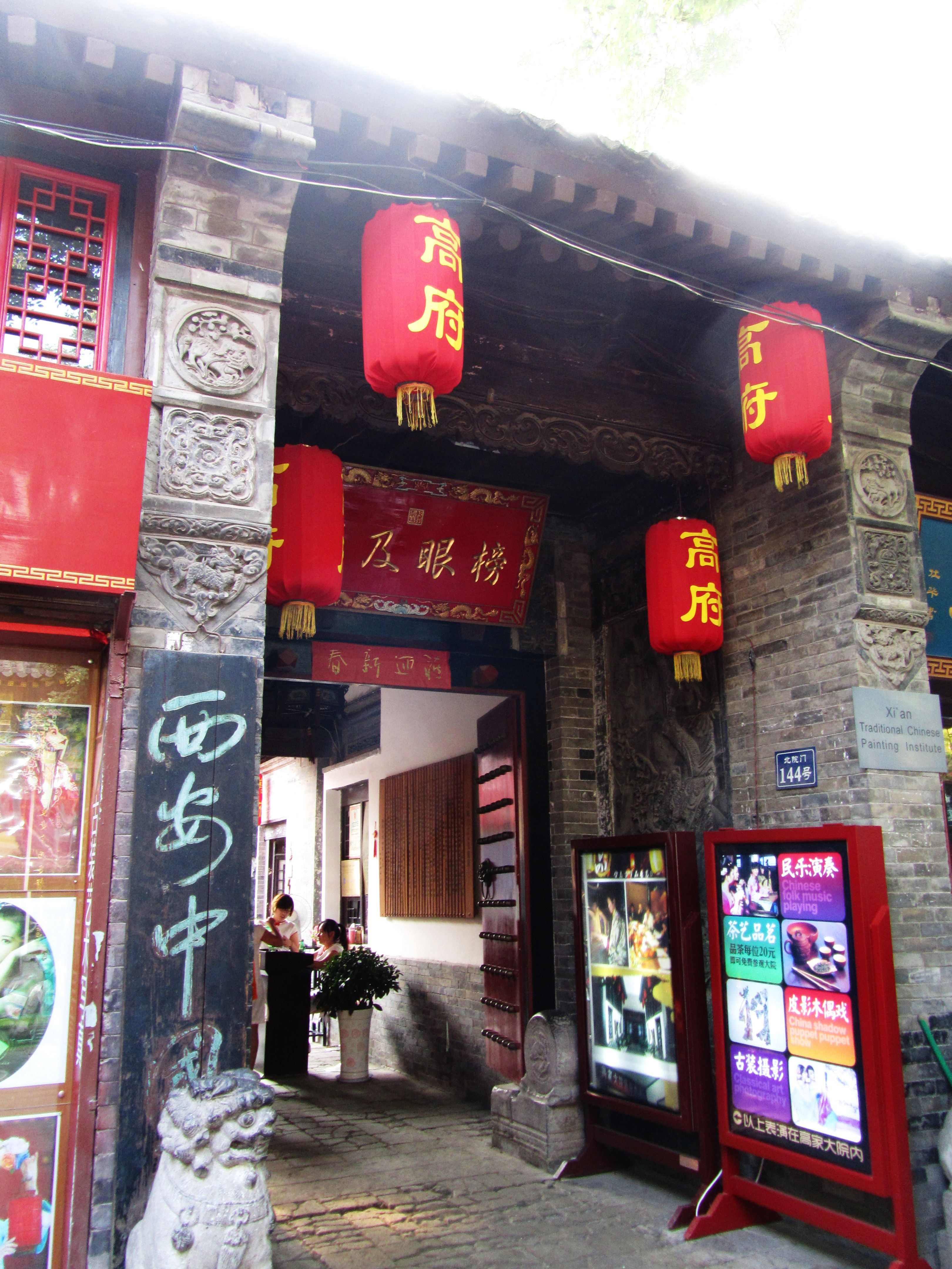 西安北院门144号民居（高岳崧故居）大门。